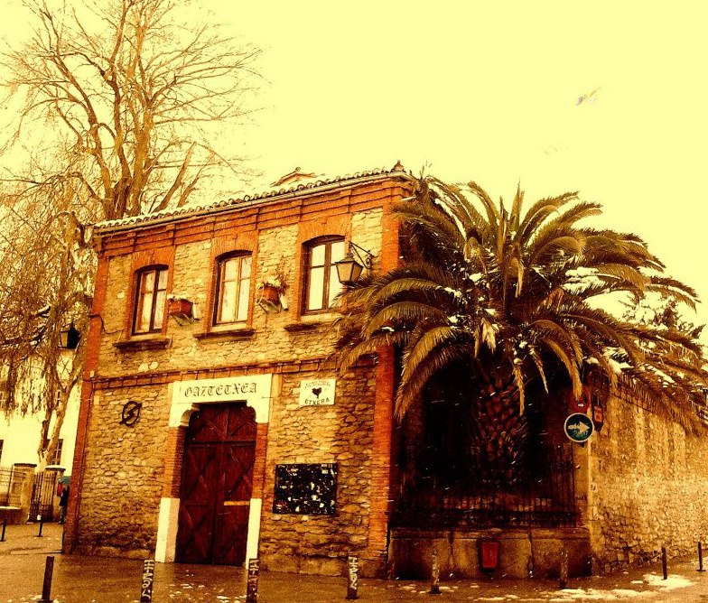 El centro social okupado de Vitoria-Gasteiz nevando